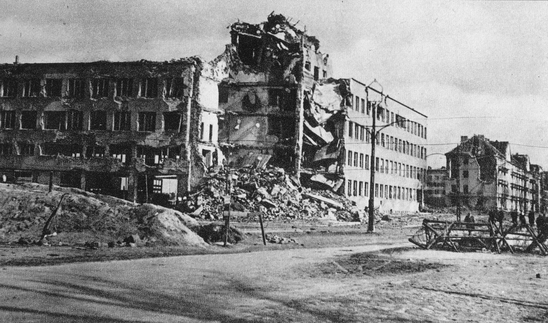 Uszkodzony Budynek Szkoły Oficerów Pożarnictwa (obecnie Szkoła Główna Służby Pożarniczej) przy ul. Słowackiego 52/54 w Warszawie